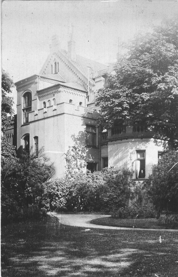 Gartenansicht des Wohnhauses der Familie des Kaufmannes, Textil- und Seidenwaren-Großhändlers, Handelsgerichtsrates, Wirtschaftsführers und Türkischen Konsuls Franz Bühring in der Wiesenstraße 30 in Hannover (Südstadt) vor der Zerstörung durch die Luftangriffe auf Hannover im Zweiten Weltkrieg ...